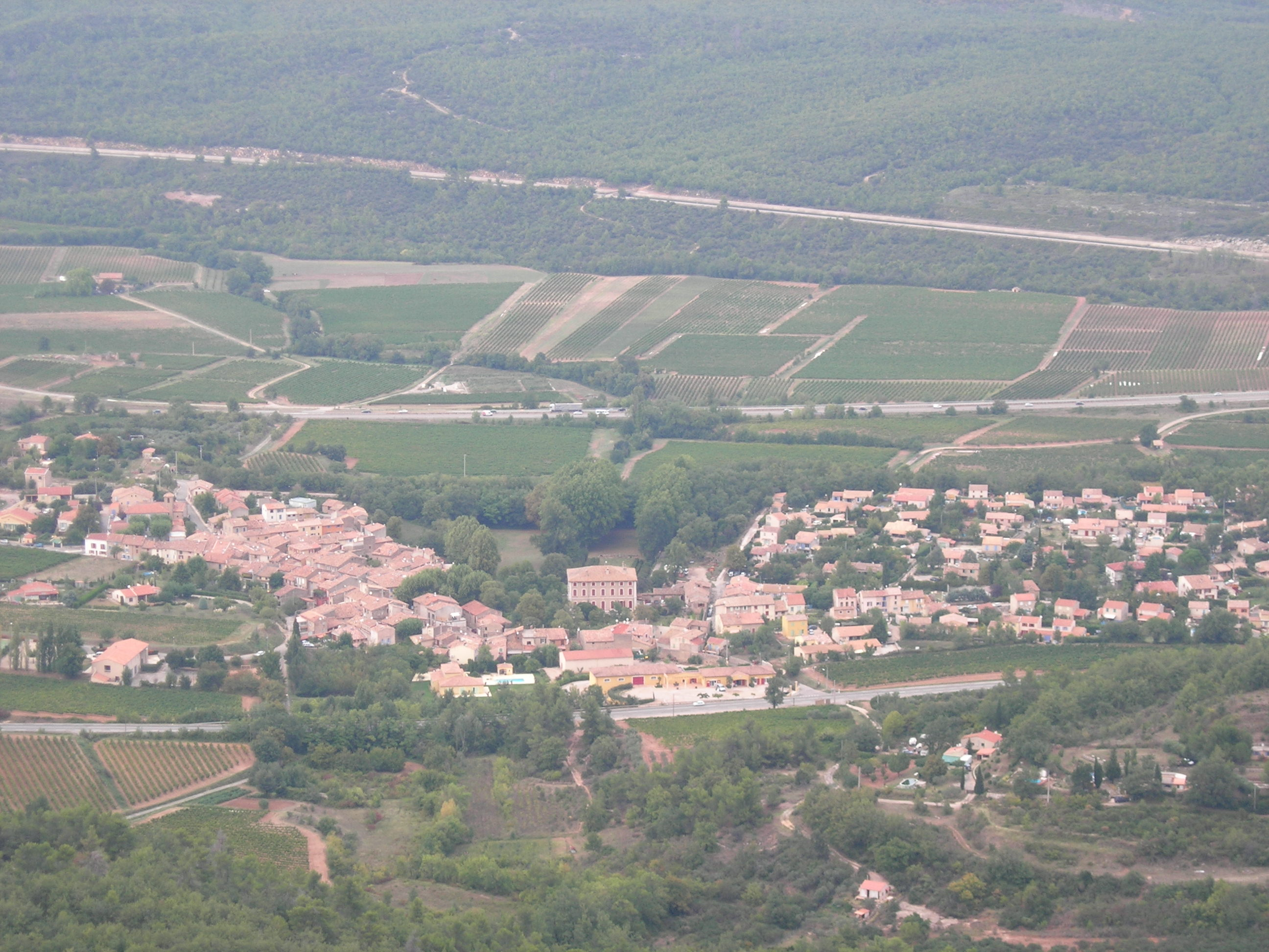 Village de Pourcieux vu du Mont Aurélien